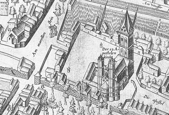 Ausschnitt des Mercator – Stadtplanes Köln. Bereich Gertrudenstraße Off der Muren) Sankt Aposteln bis Marsilstein 1571